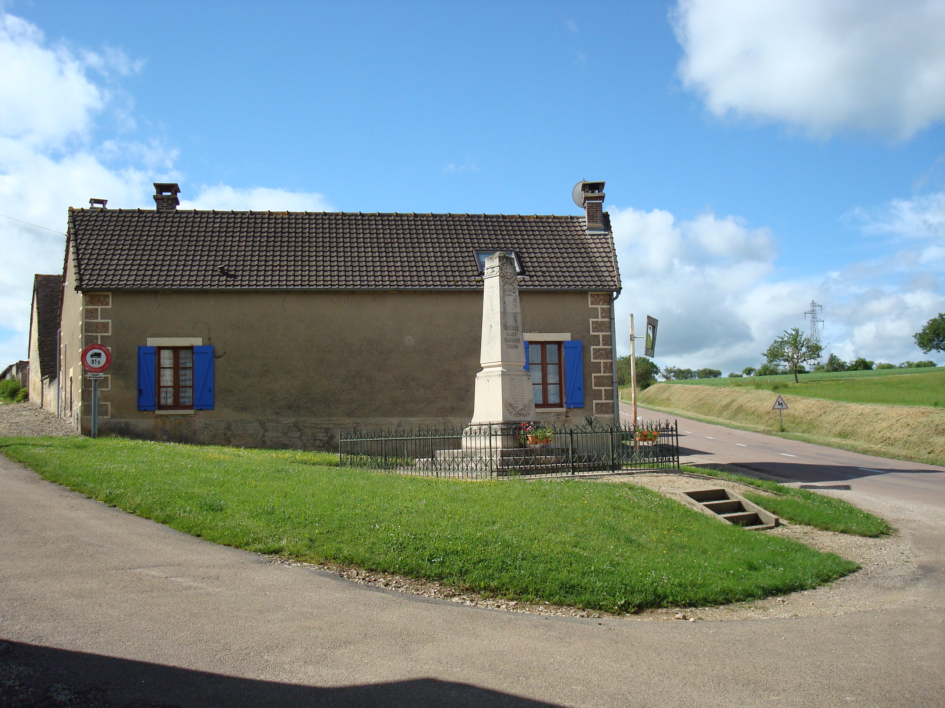 Coussegray